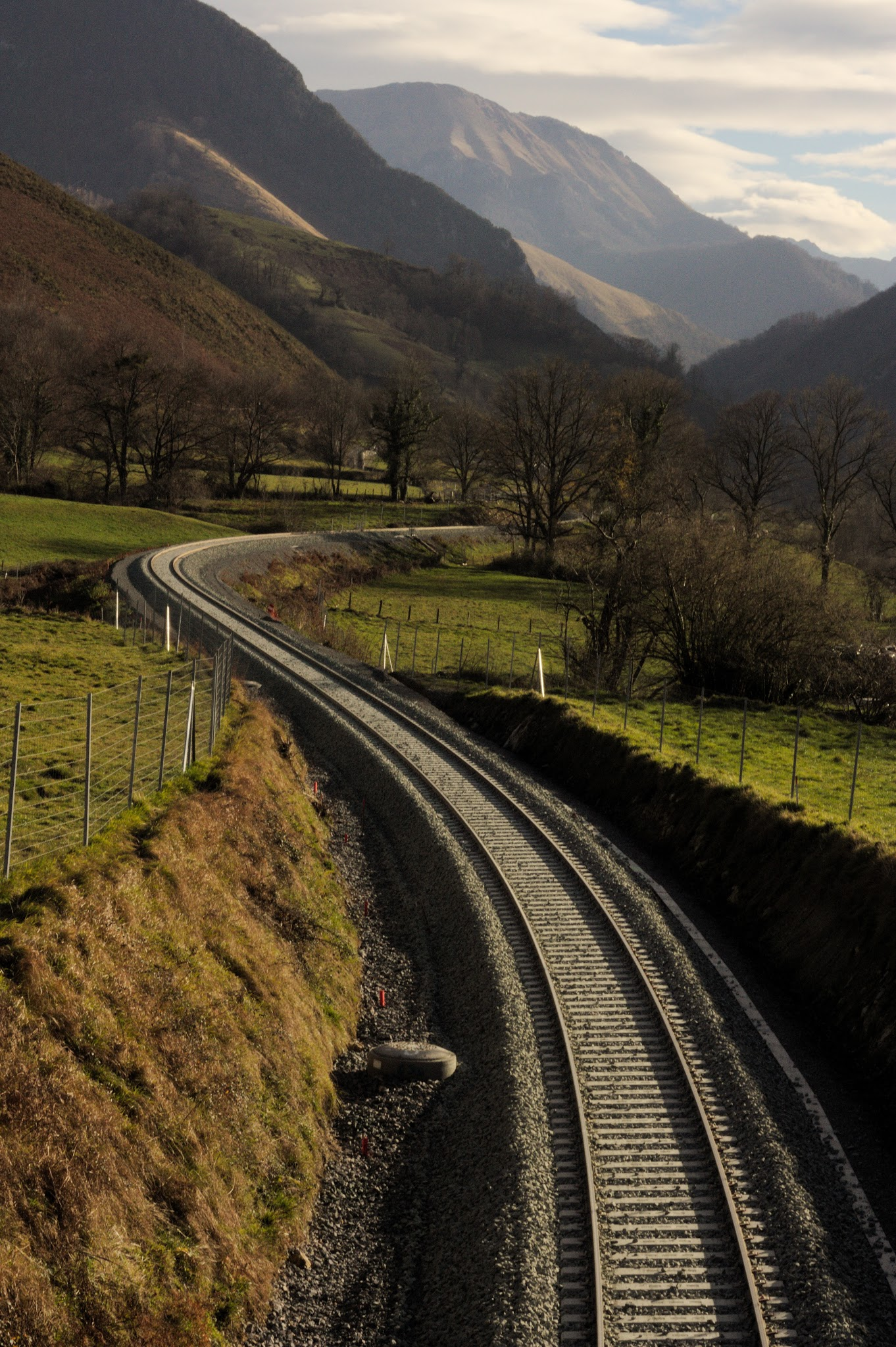 Image prise pendant le chantier de rénovation entre Oloron et Bedous, le 24 décembre 2015. Image CC Jujuinconnu/Inujust R.